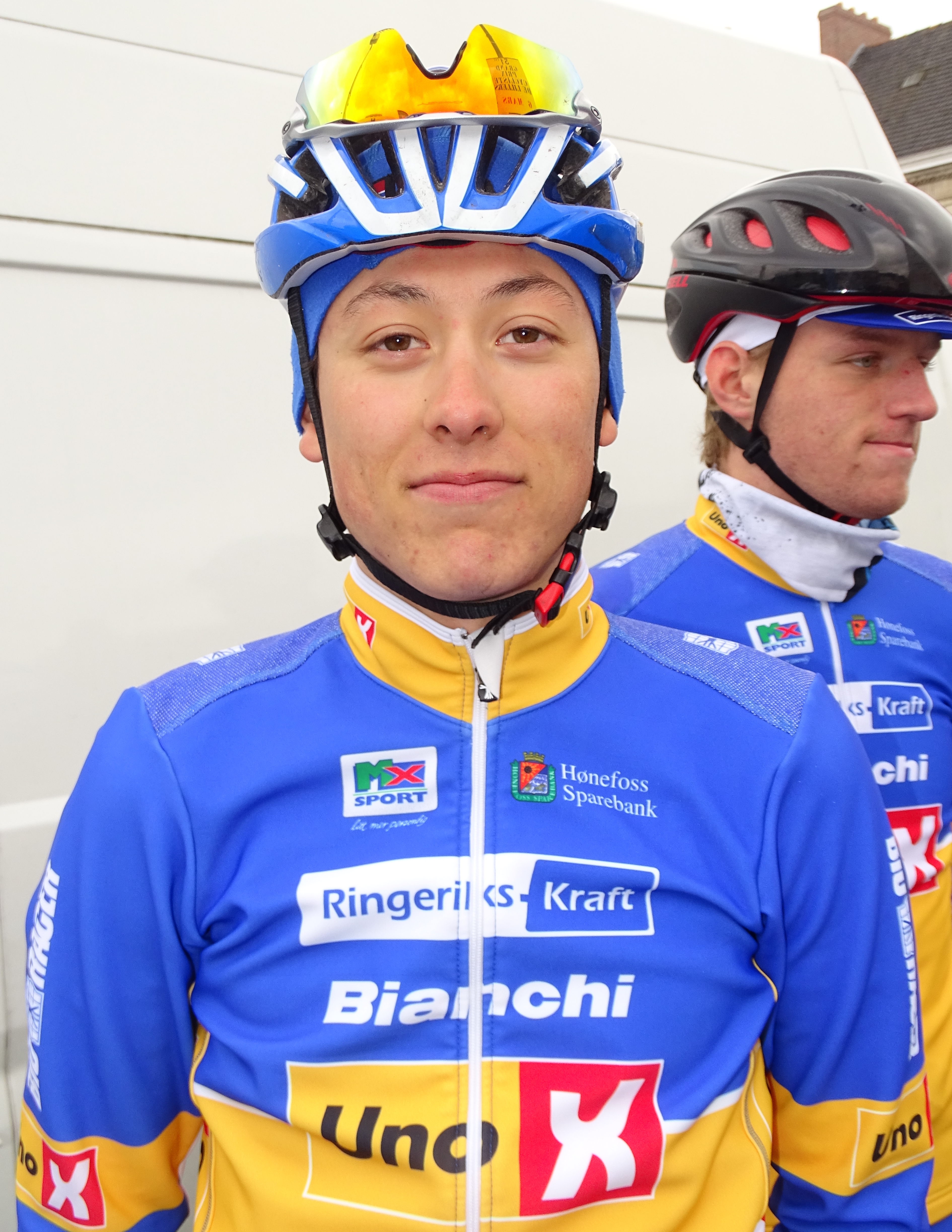 Reportage réalisé le dimanche 6 mars à l'occasion du départ et de l'arrivée du Grand Prix de Lillers-Souvenir Bruno Comini 2016 à Lillers, Pas-de-Calais, Nord-Pas-de-Calais, France.